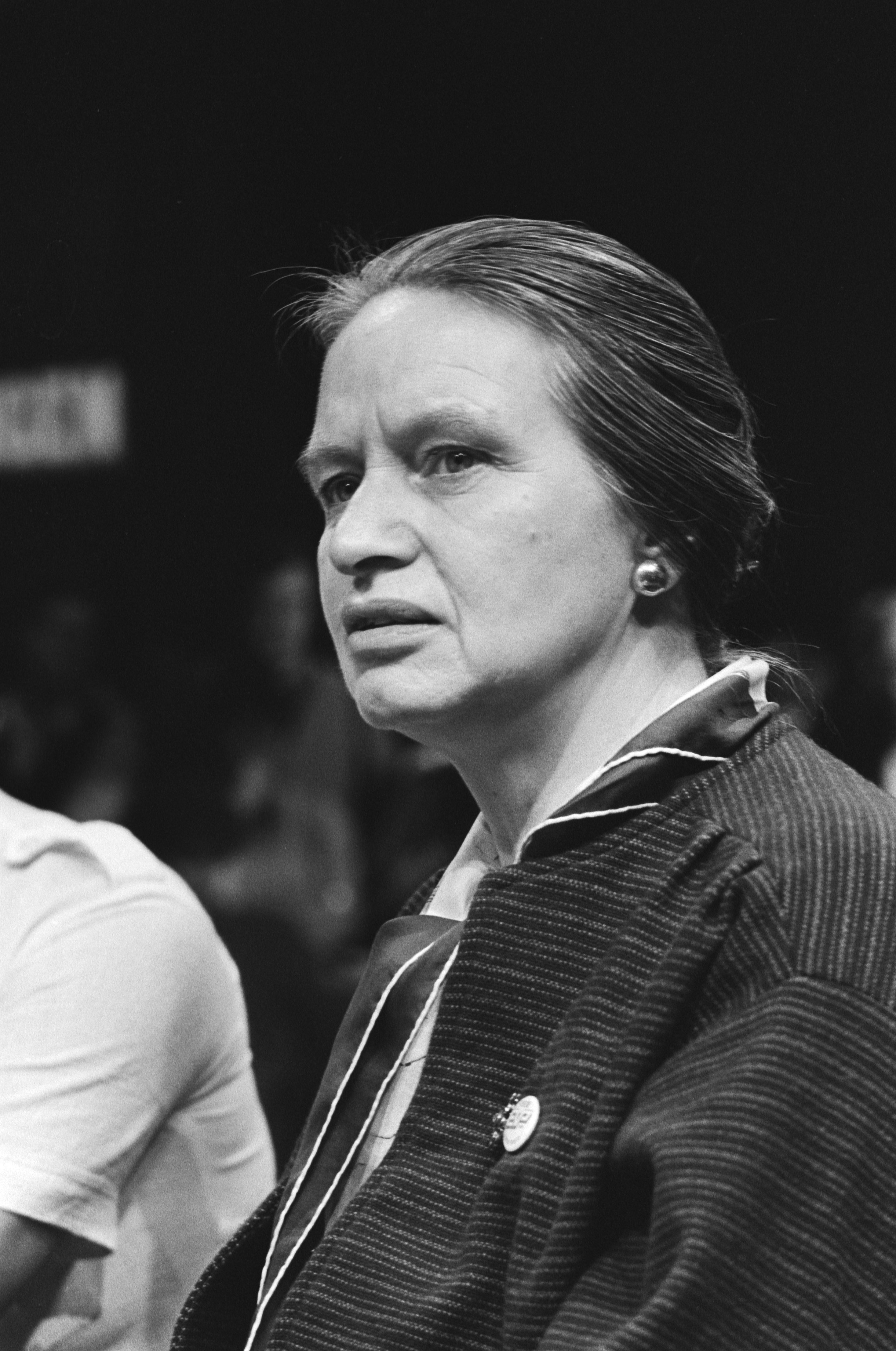 Collectie / Archief : Fotocollectie Anefo Reportage / Serie : TV-uitzending na de verkiezingen Beschrijving : Cathy Ubels (EVP) Annotatie : Randnummers negatiefstrook: 15 Datum : 8 september 1982 Trefwoorden : lijsttrekkers, portretten, verkiezingen Persoonsnaam : Ubels-Veen, C. Fotograaf : Bogaerts, Rob / Anefo Auteursrechthebbende : Nationaal Archief Materiaalsoort : Negatief (zwart/wit) Nummer archiefinventaris : bekijk toegang 2.24.01.05 Bestanddeelnummer : 932-3182